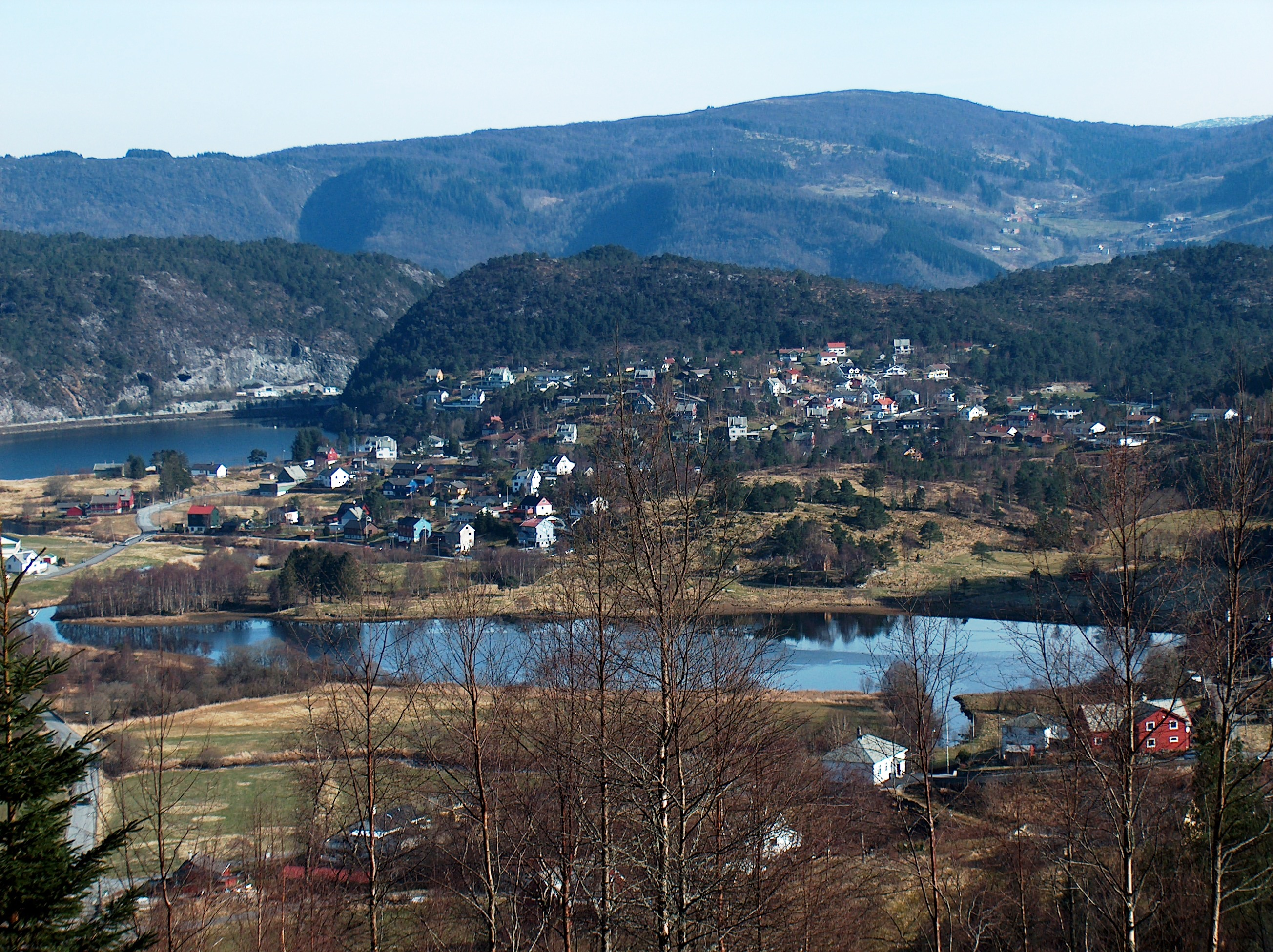 Gaupås